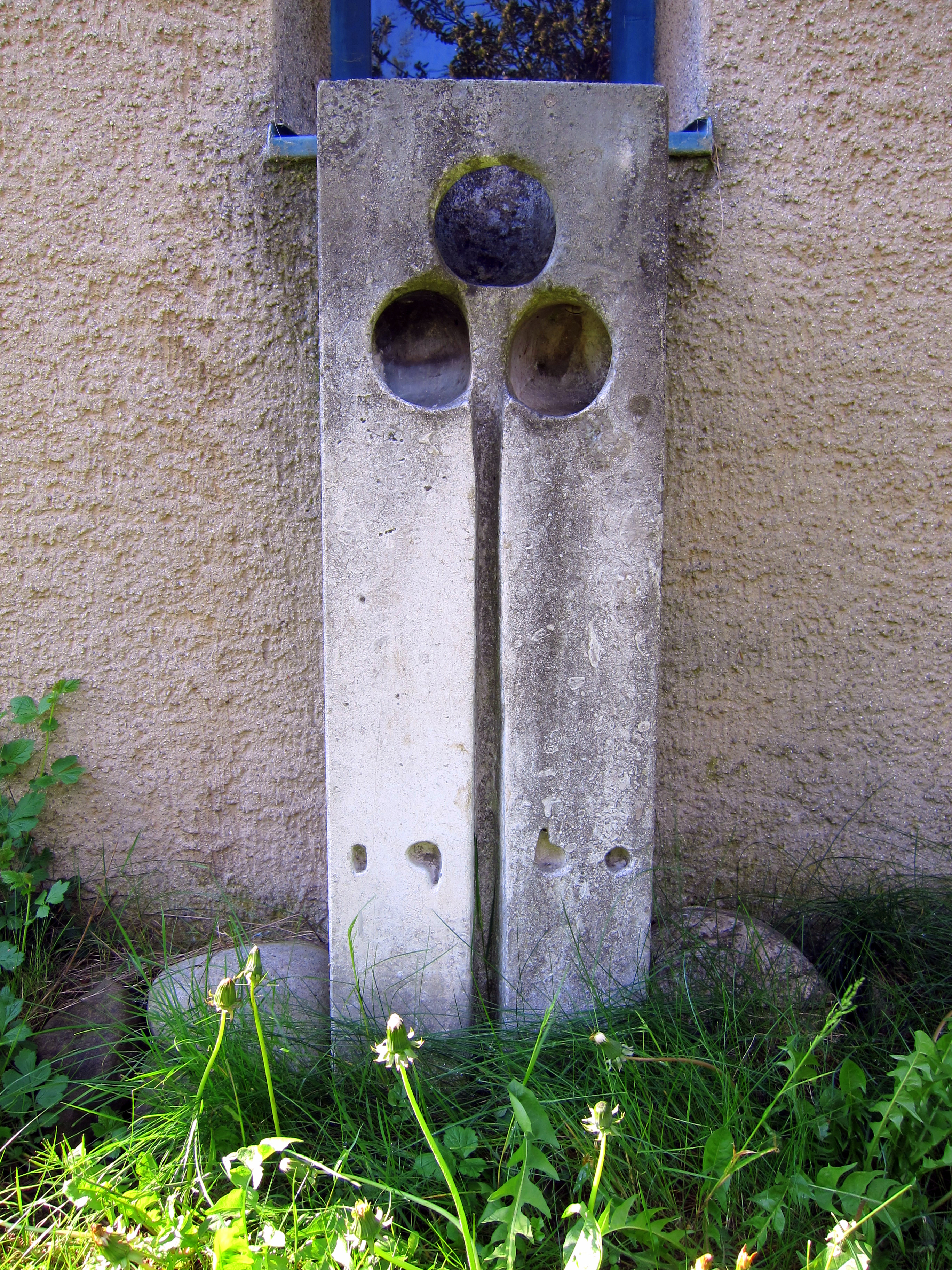 Römisch-katholische Kirche Bruder KIaus Basel, Grundstein von Albert Schilling